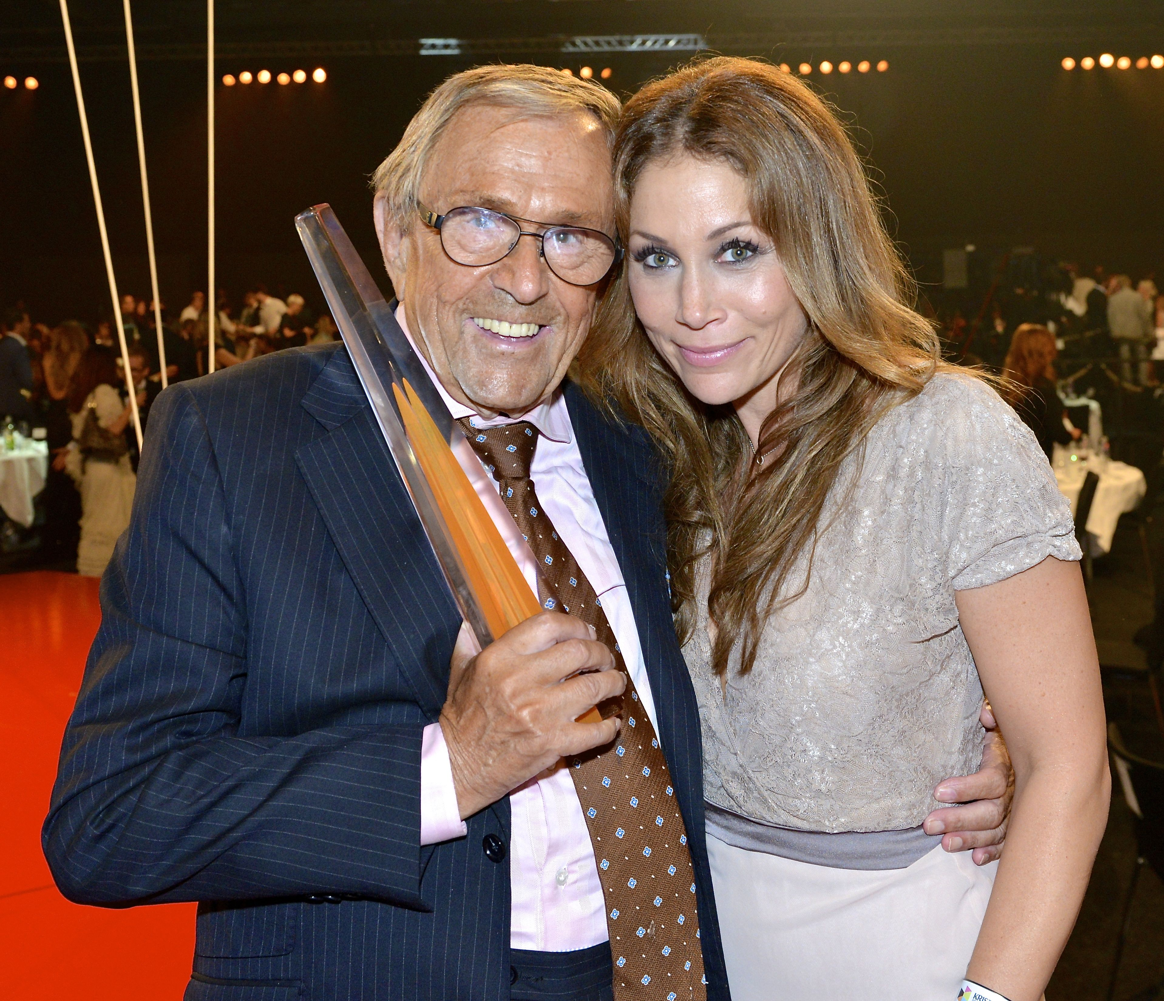 Arne Weise fick Kristallens Hederspris på Kristallengalan den 30 augusti 2013. Tilde de Paula Eby grattade.